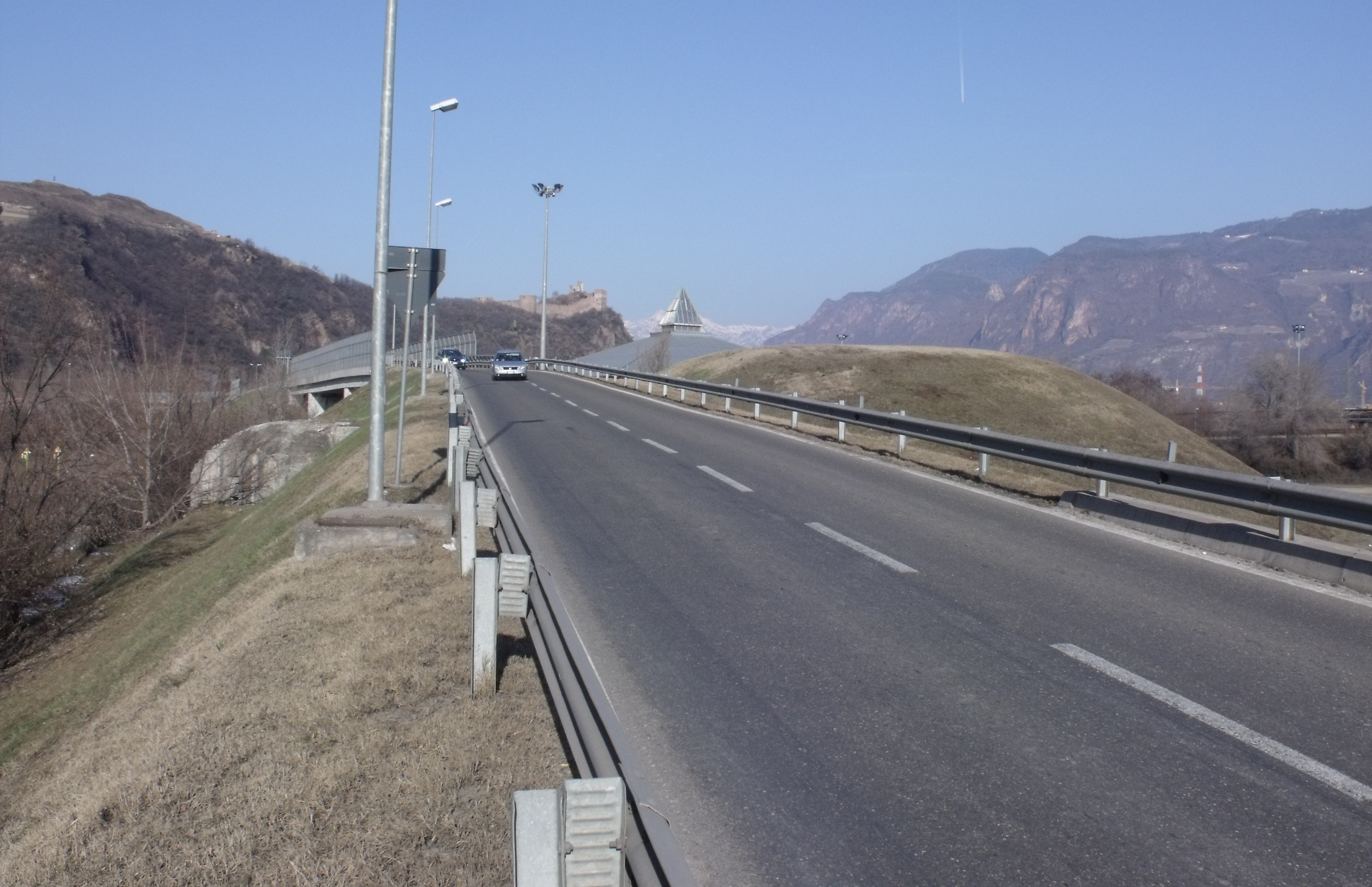 Opera 15, sbarramento Bolzano sud.